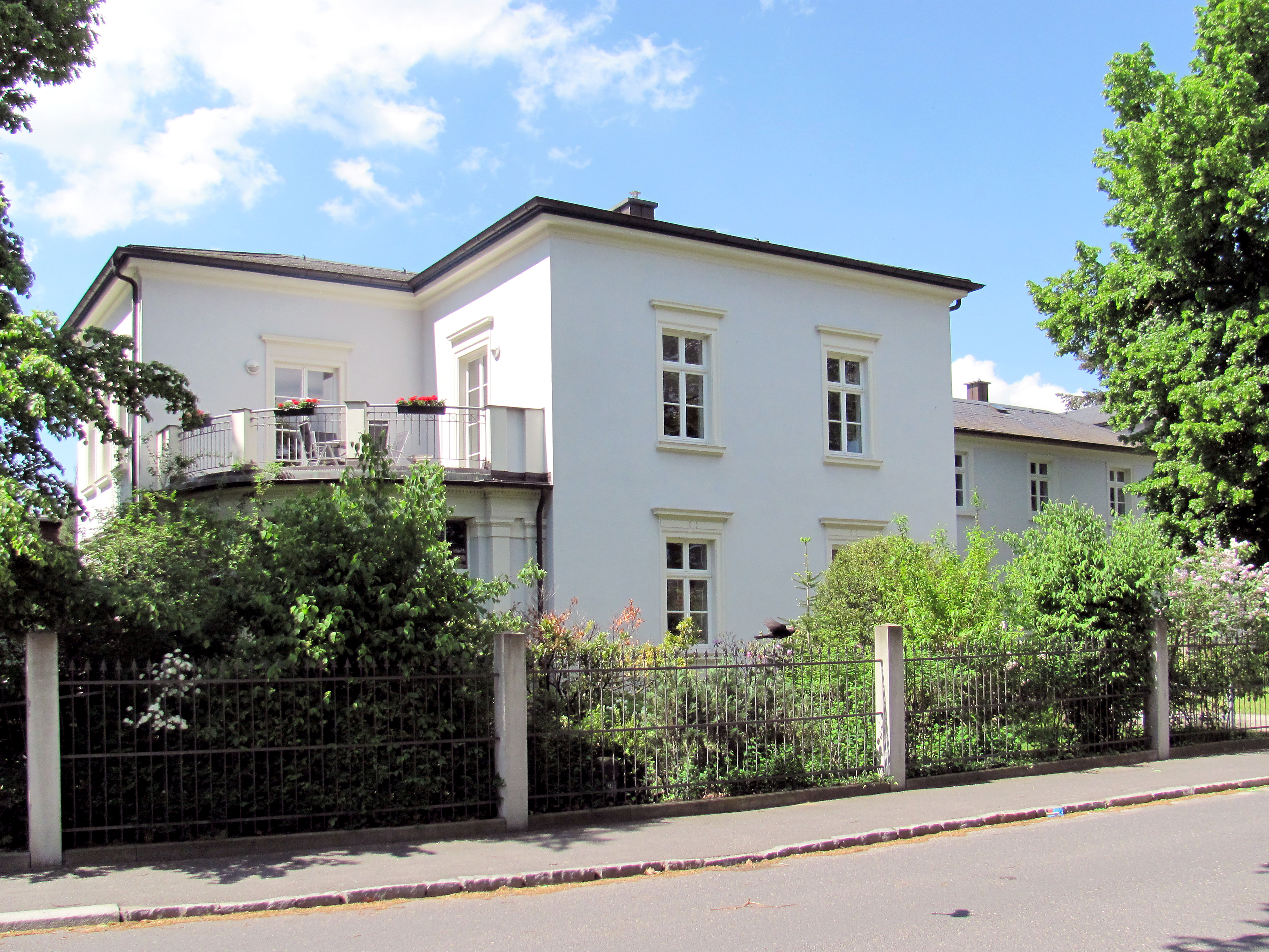 Radebeul-Niederlößnitz, Villa Zillerstraße 1/1a